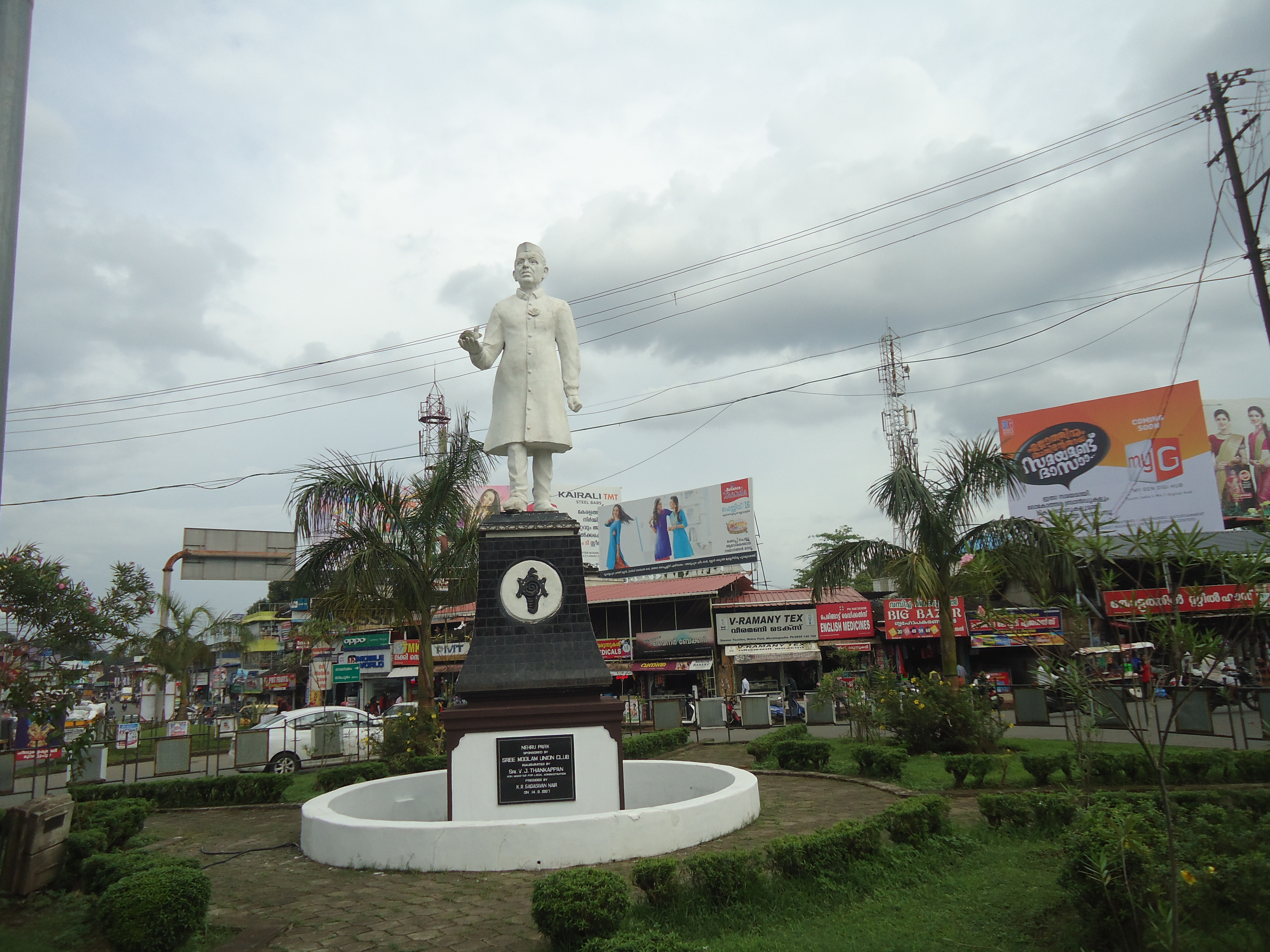 Muvattupuzha Town